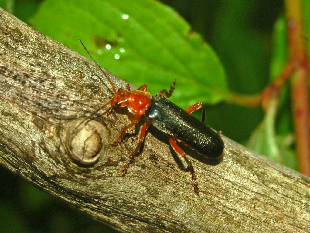 Cantharis livida var. rufipes